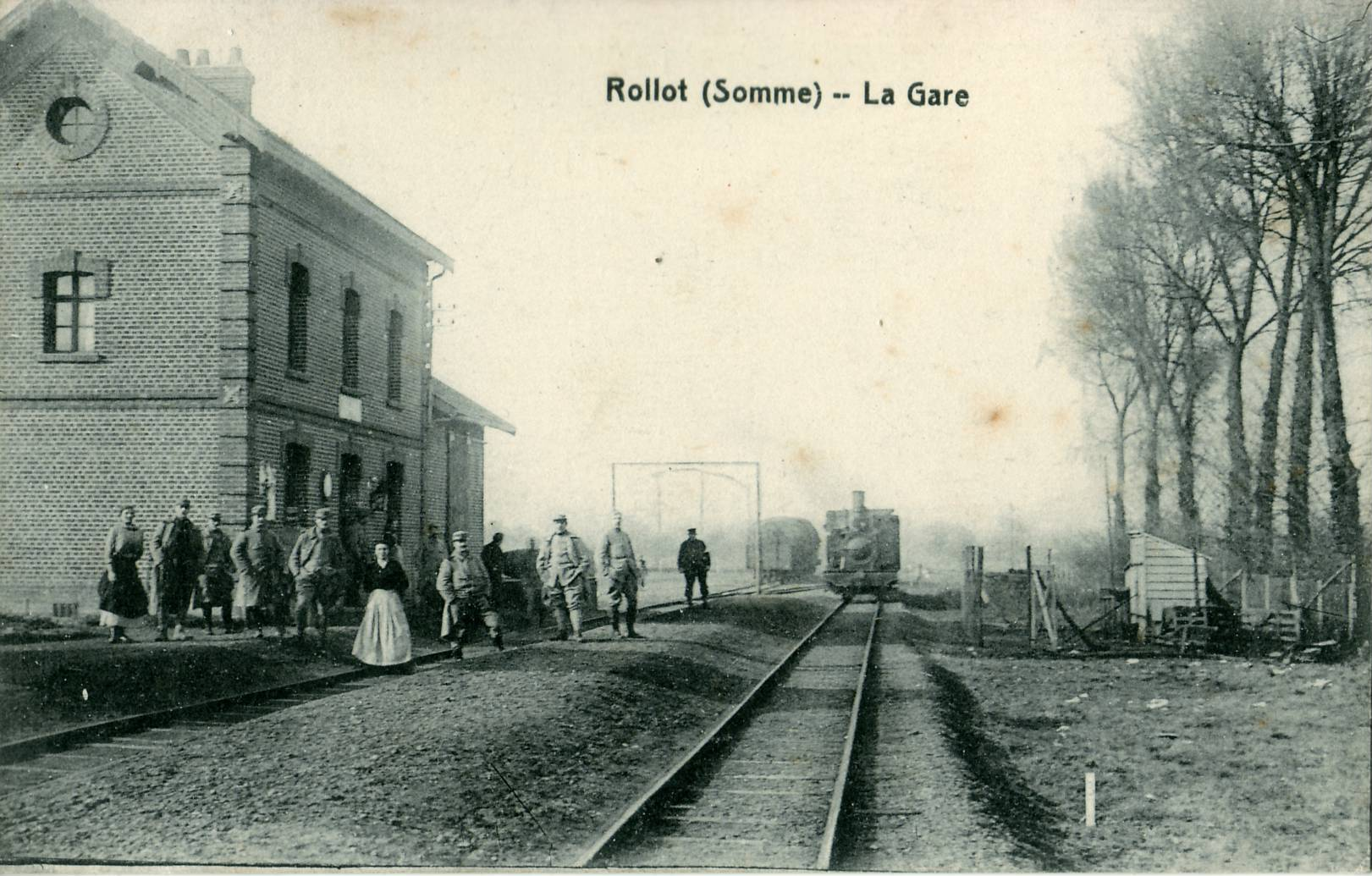 Carte postale sans nom d'éditeur :ROLLOT - La Gare(Ligne Albert - Montdidier des chemins de fer départementaux de la Somme)